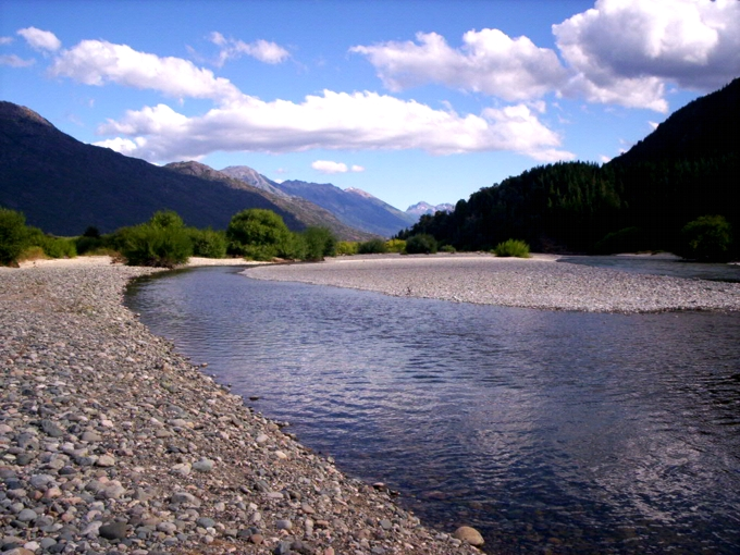 Este es el Rio Azul. Partiendo del Glaciar de El Hielo Azul, en lo alto de la Cordillera de Los Andes, desciende atravezando los bosques mas profundos de El Bolson. Fuente